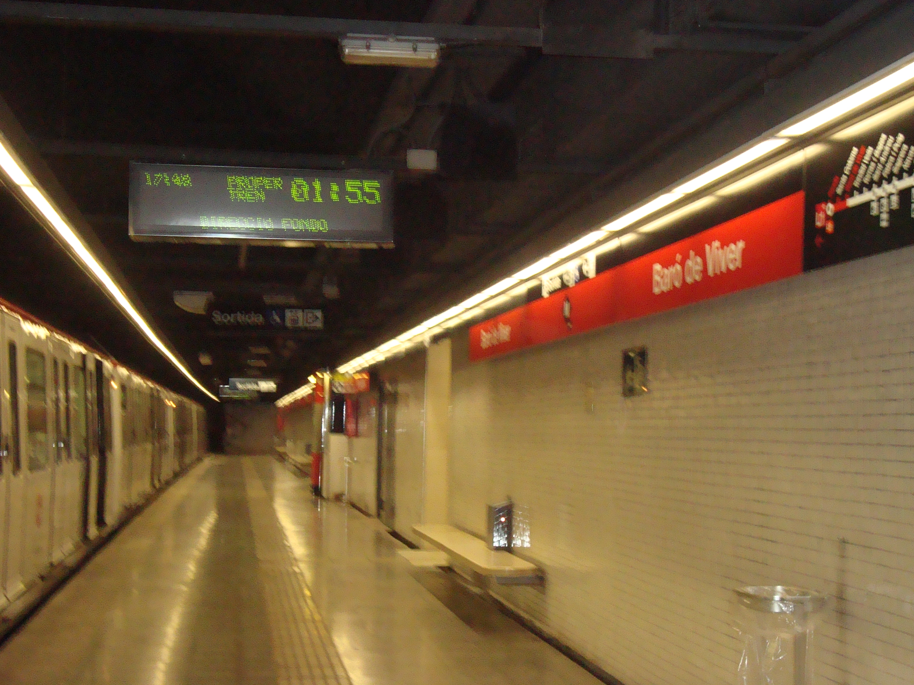 Estació de Baró de Vivir del metro de Barcelona.